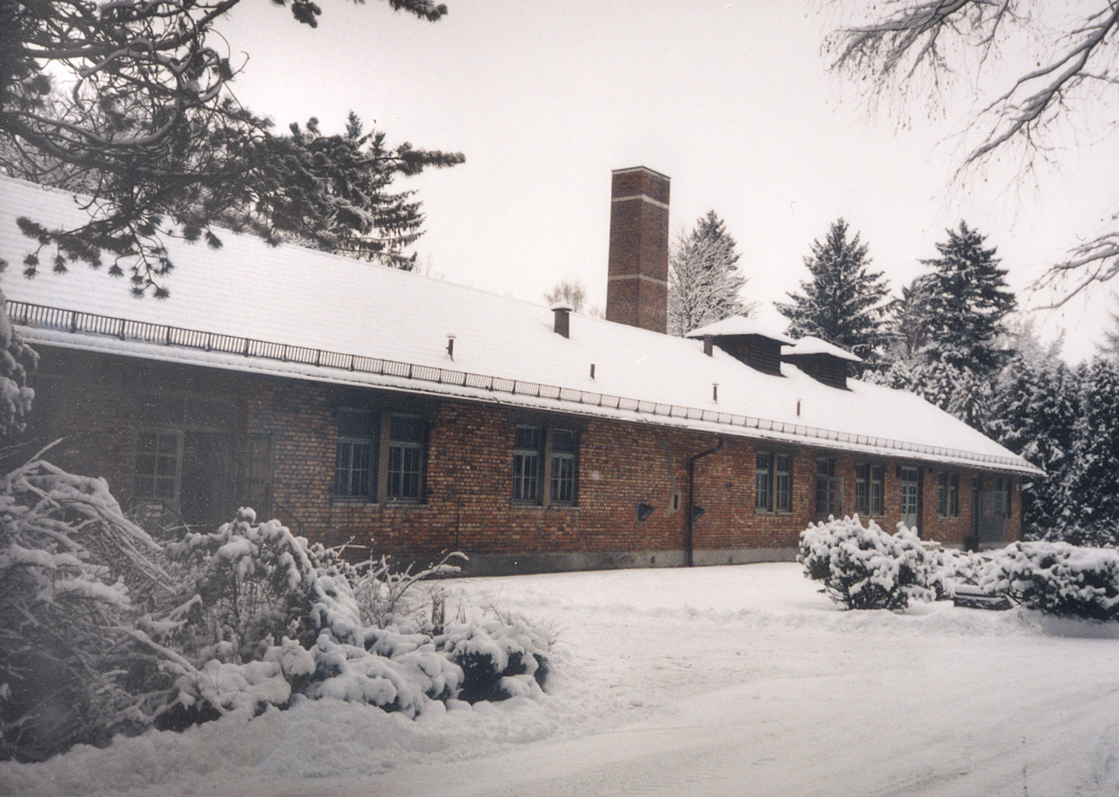 KL Dachau Block X